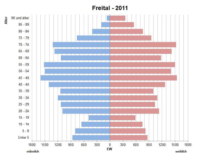 Bevölkerungspyramide der Stadt Freital nach Zensus 2011.